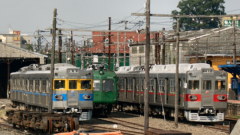 熊本電気鉄道用にアップロードした画像です。良い画像があれば別の画像に変えてください。